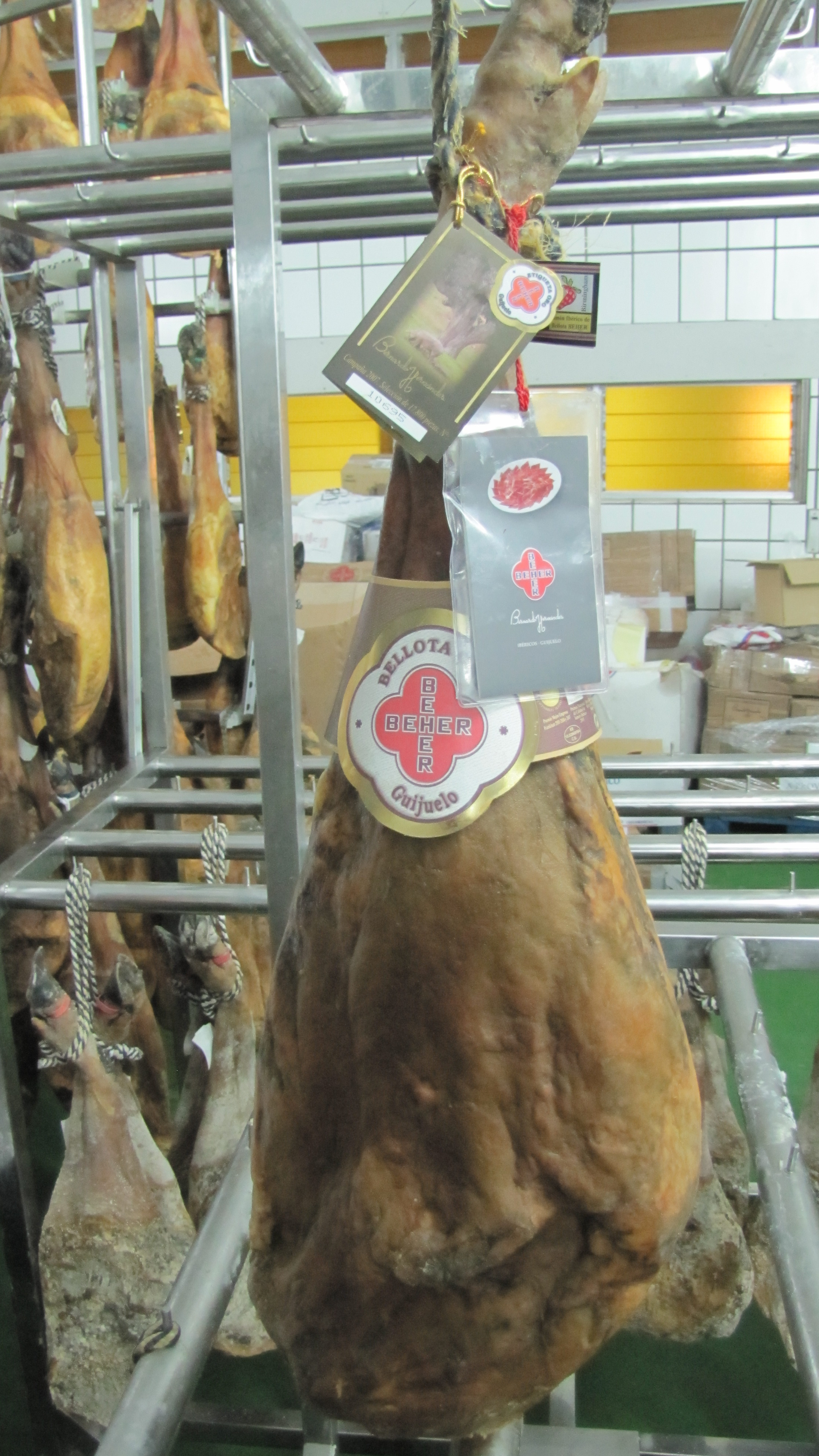 En primer plano un jamón de bellota BEHER, Bernardo Hernandez, Etiqueta Oro 2007, en las instalaciones de BEHER, en Guijuelo (Salamanca, España). Campaña que fue premieda en la Feria Internacional de Frankfurt 2007 como el mejor jamón del mundo. Pieza obtenida de las extremidades posteriores del cerdo ibérico engordado en montanera con alimentación basada en bellotas y curado durante más de 30 meses. La pieza está rodeada de otras diferentes. Se puede leer en la etiqueta «Campaña 2007, Selección de 17800 piezas, Nº 10695».